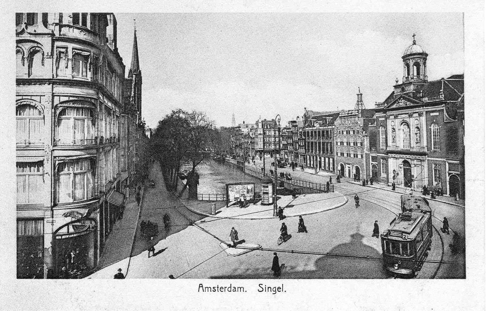 Photographed in Amsterdam between 1900 and 1914.